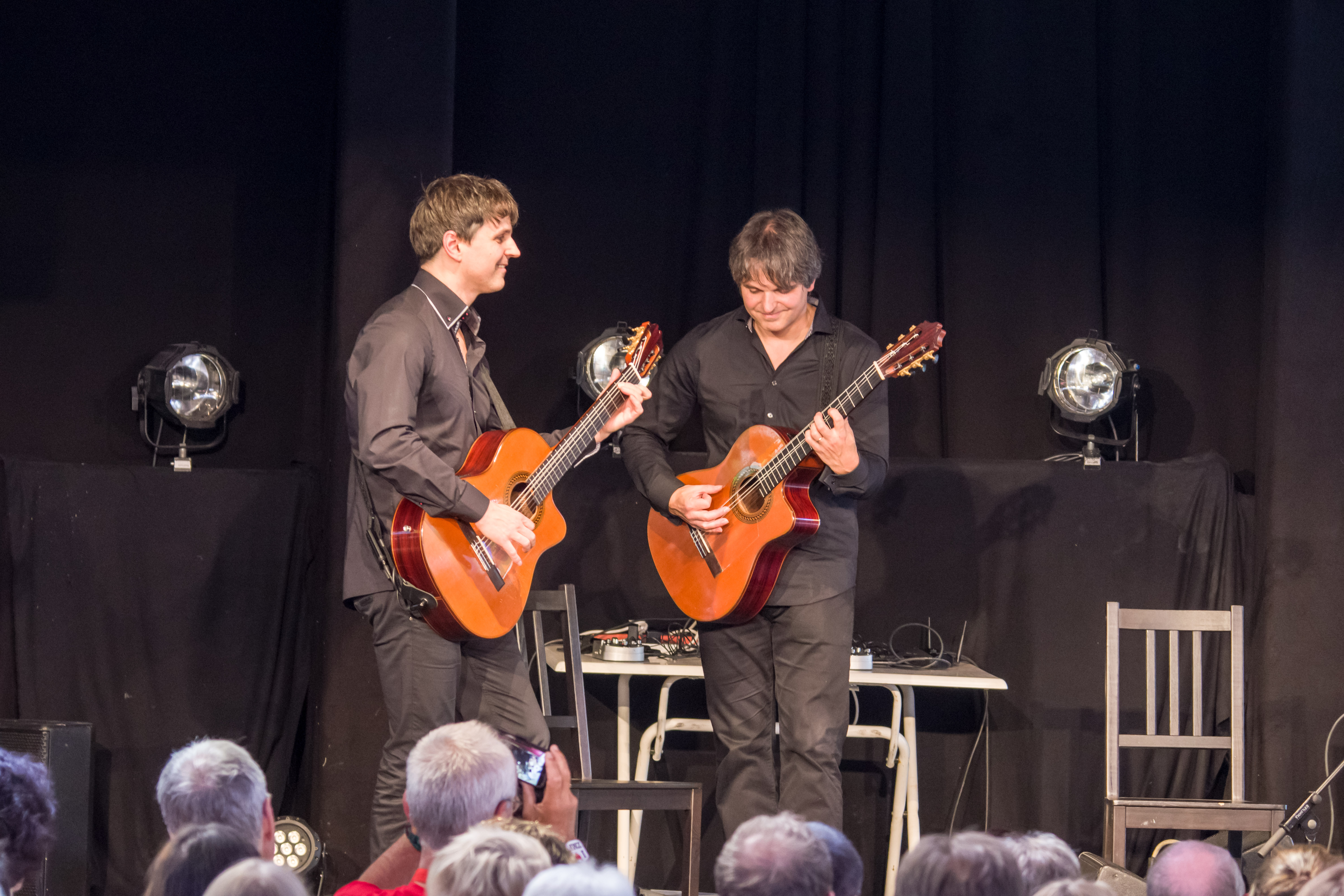 Das Zelt-Musik-Festival 2017 in Freiburg im Breisgau Klassik-Matinée am 16.07.2017 Katona Twins